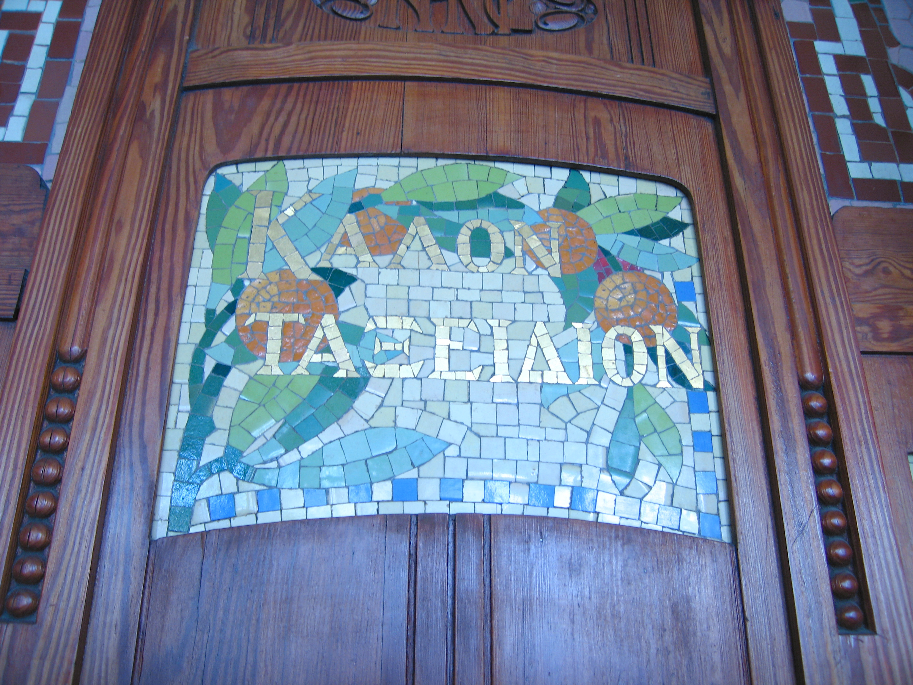 Detall del vestíbul de l'estació del Nord de València, que diu Kalón taxídion, "bon viatge", en grec.